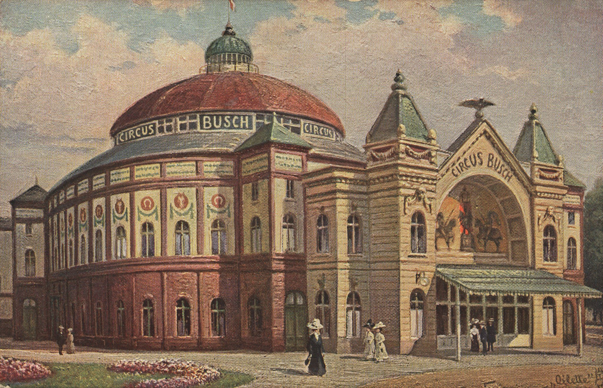 Alte Postkarte, Gebäude des Circus Busch in Berlin um 1900